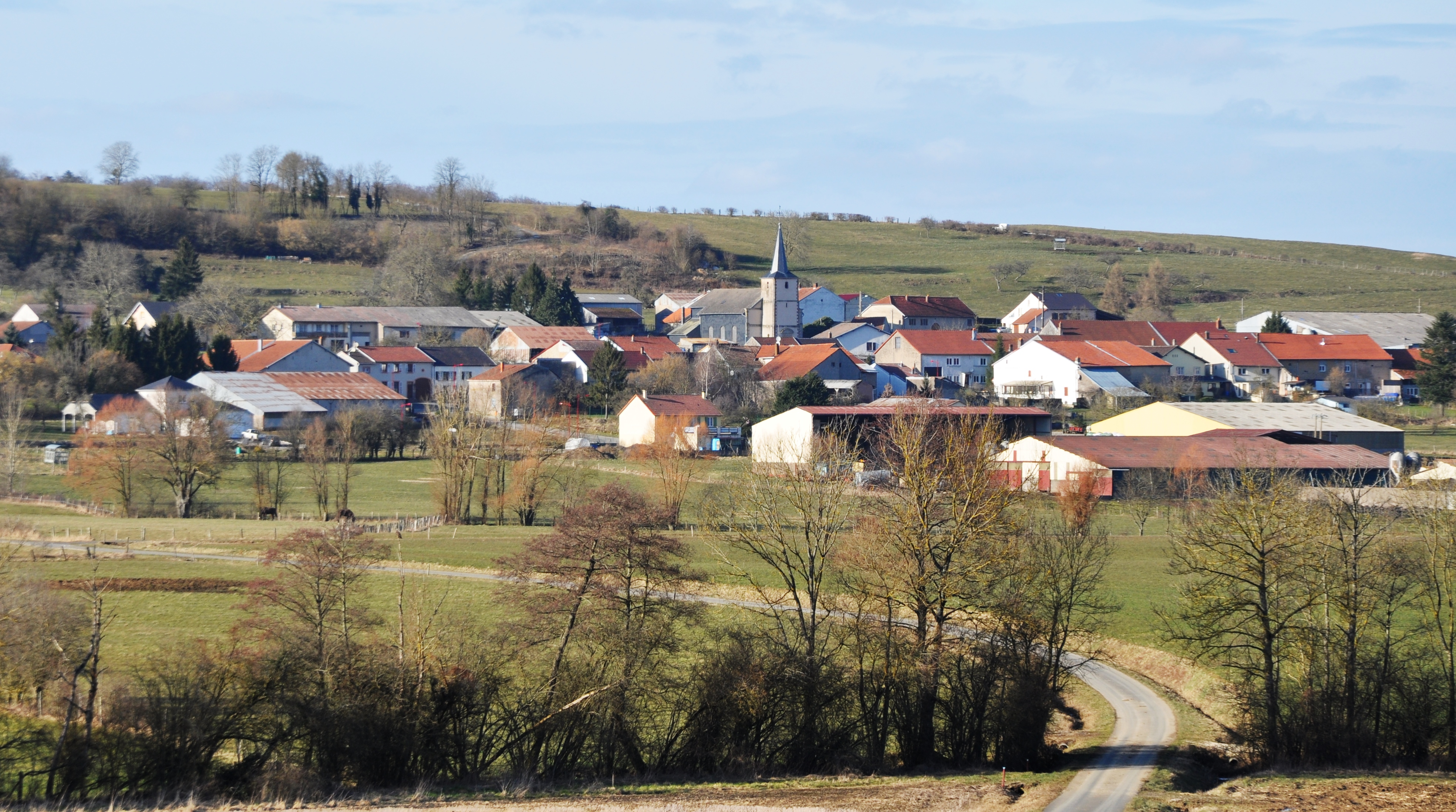 Vue sur le village